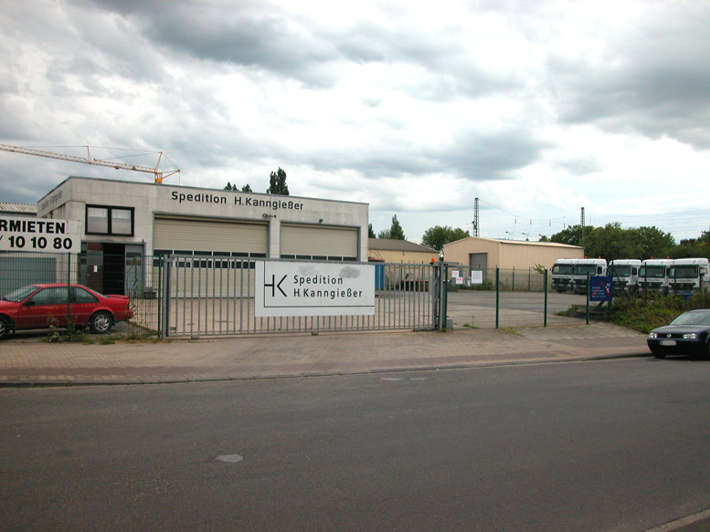 Die Straße «Bamberger Straße» in Benrath, Düsseldorf